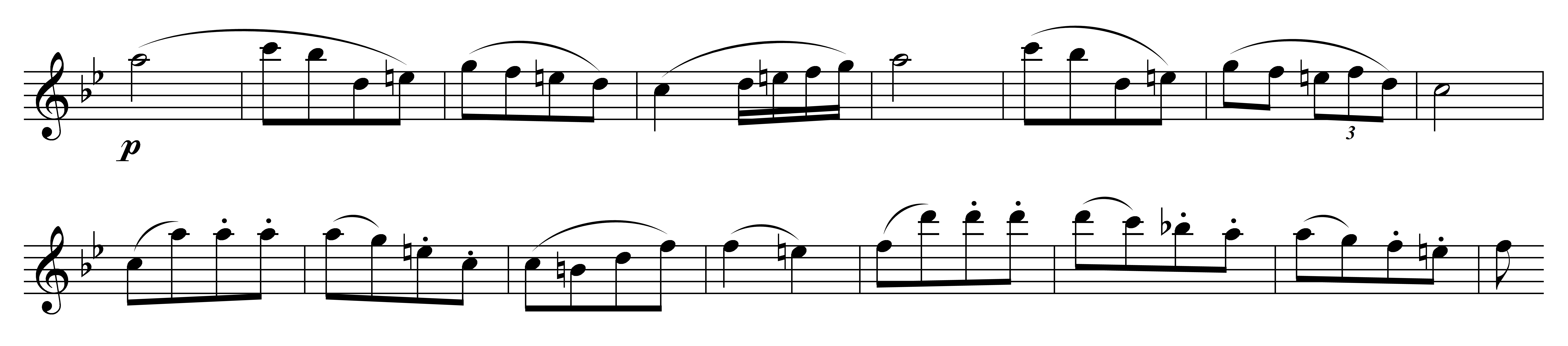 Notenbeispiel Schubert Sinfonie 5 - 4.Satz Seitenthema T. 79-94